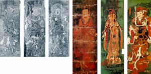 영주 부석사